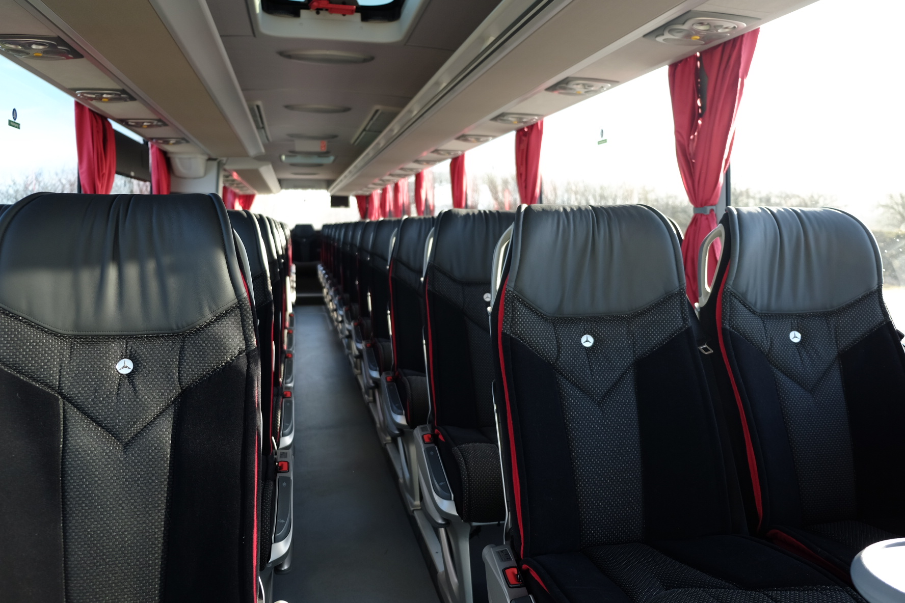 Interiör i Swebus Mercedes-bussar inköpta mars 2014